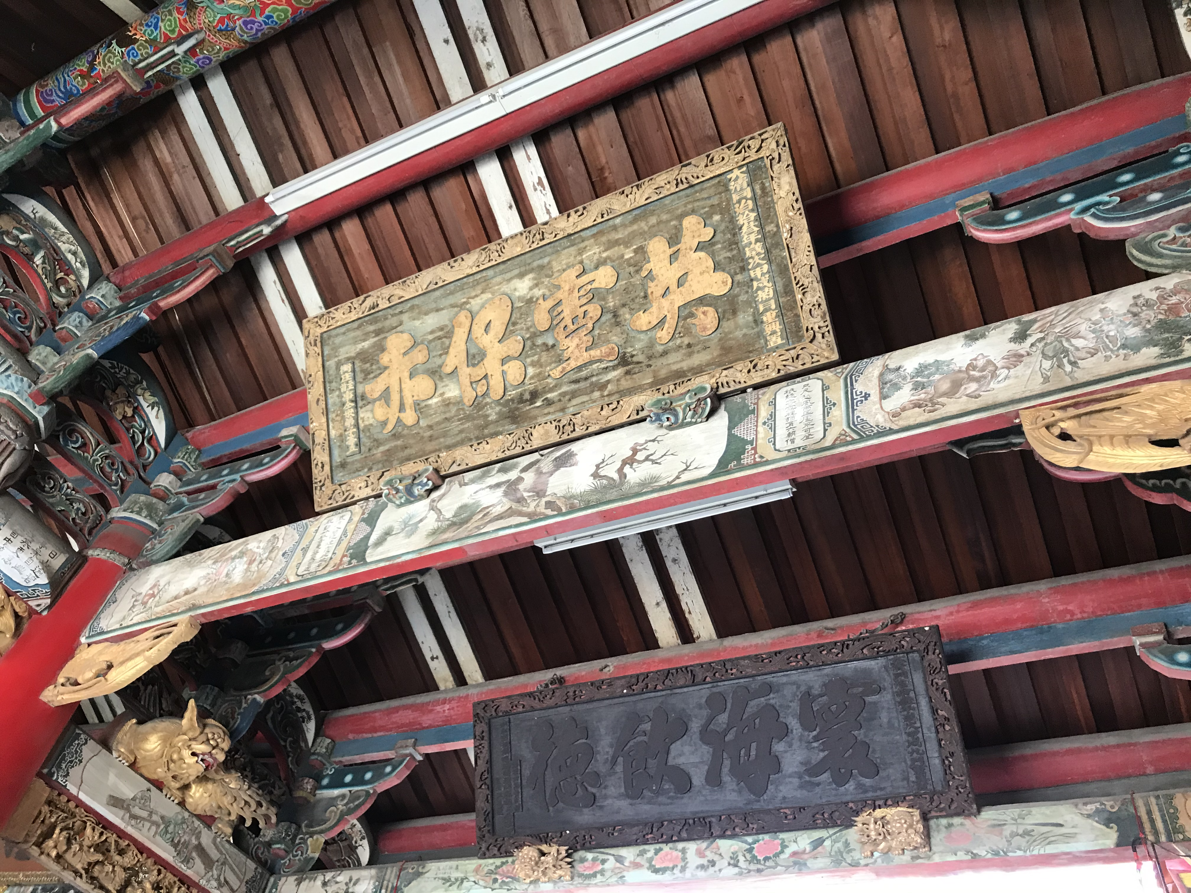 西螺廣福宮同治十三年「寰海飲德」 、「英靈保赤」匾